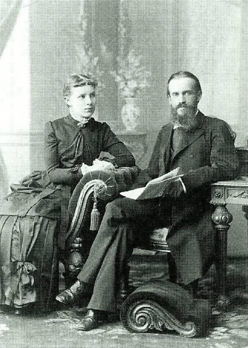 Русский философ-спиритуалист Л. М. Лопатин и его сестра Е. М. Лопатина